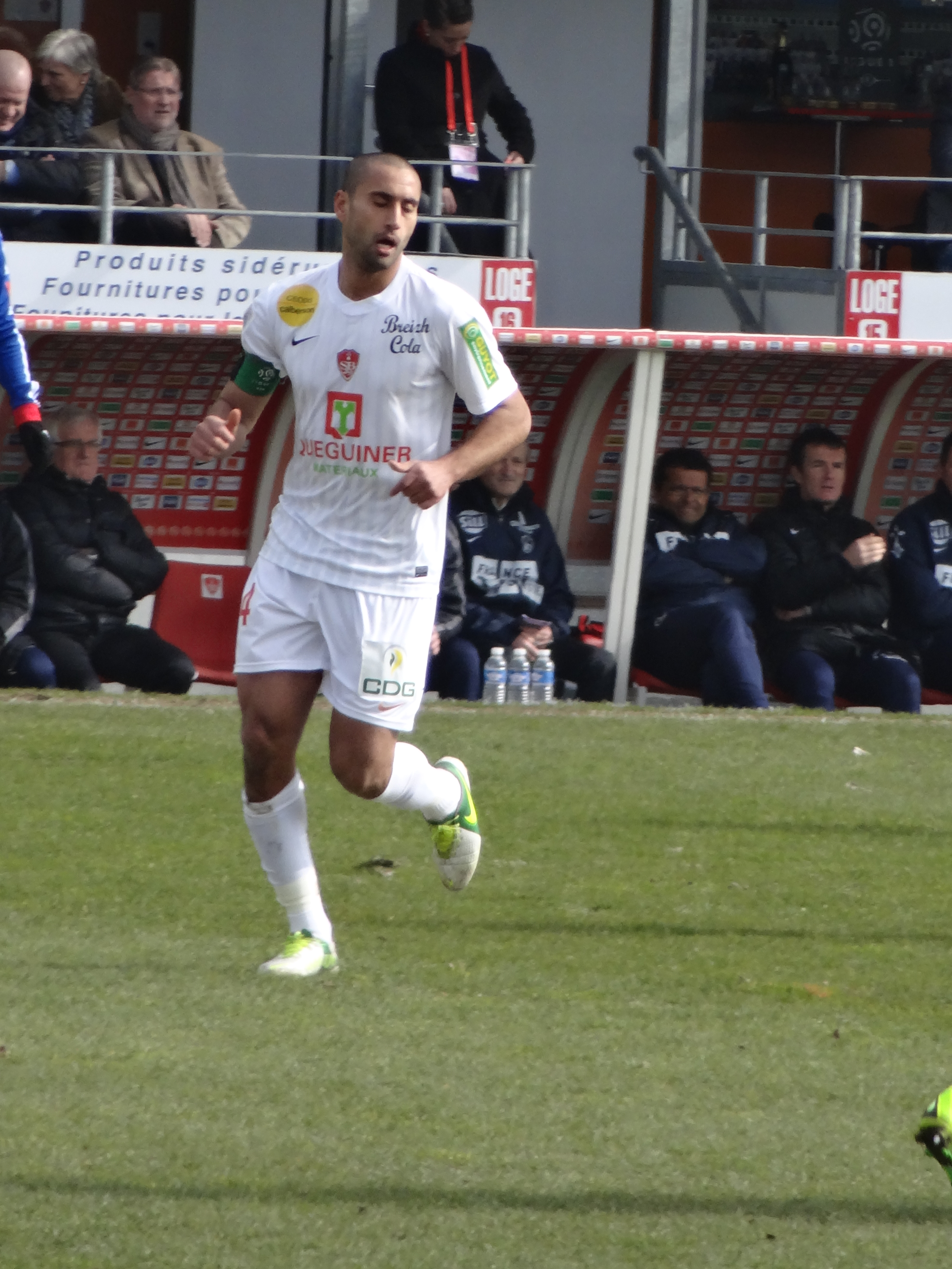 Match de football (Ligue 1) entre le Stade brestois 29 et l'Olympique lyonnais, le 3 mars 2013